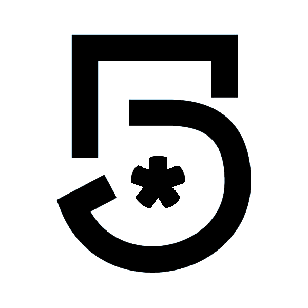 Logotipo del Canal 5 de Televisa.